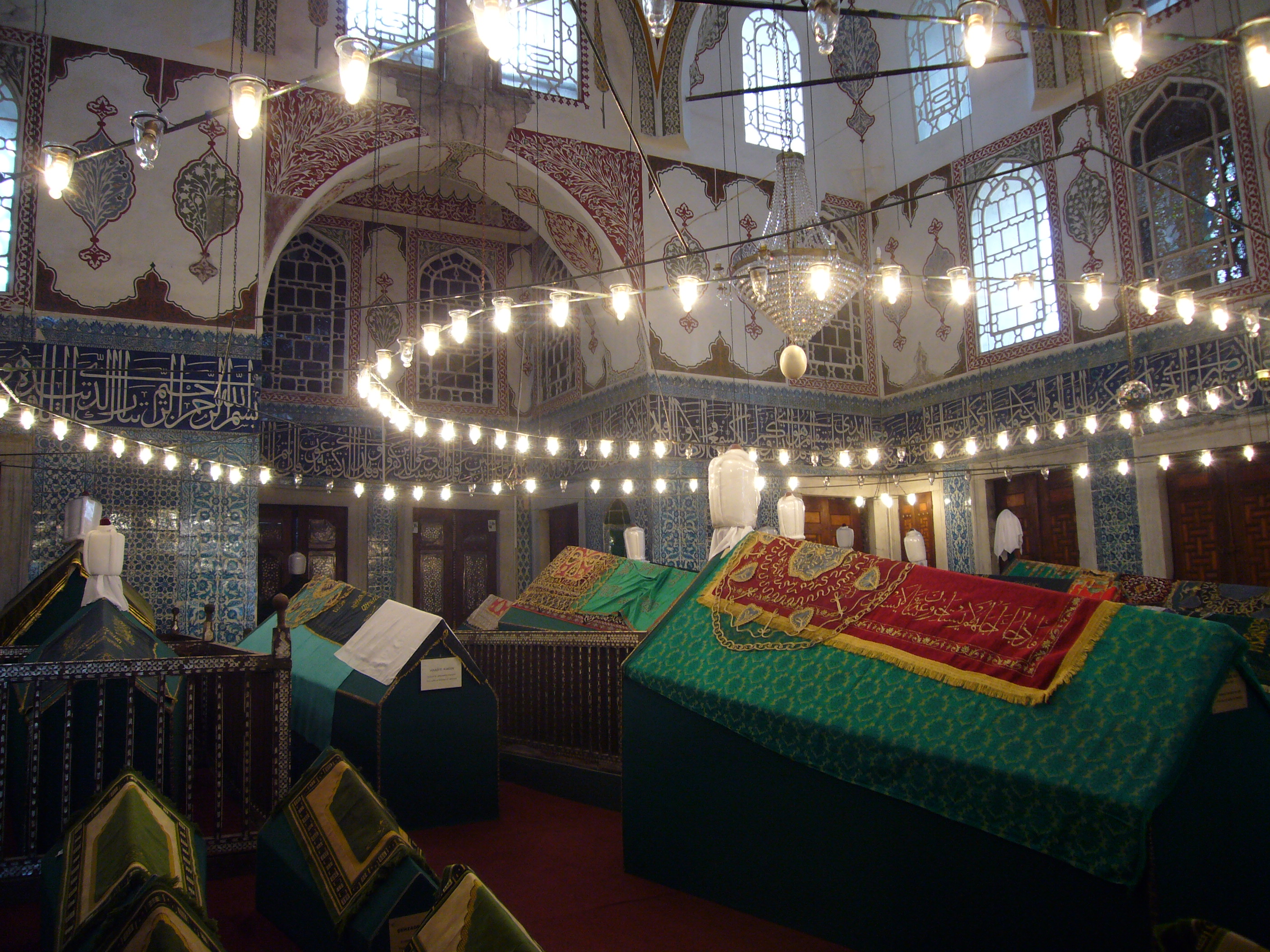 Istanbul, mausoleo di Turhan Hatice alla Yeni Cami, tombe